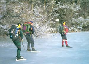 Tre personer som åker långfärdsskridsko